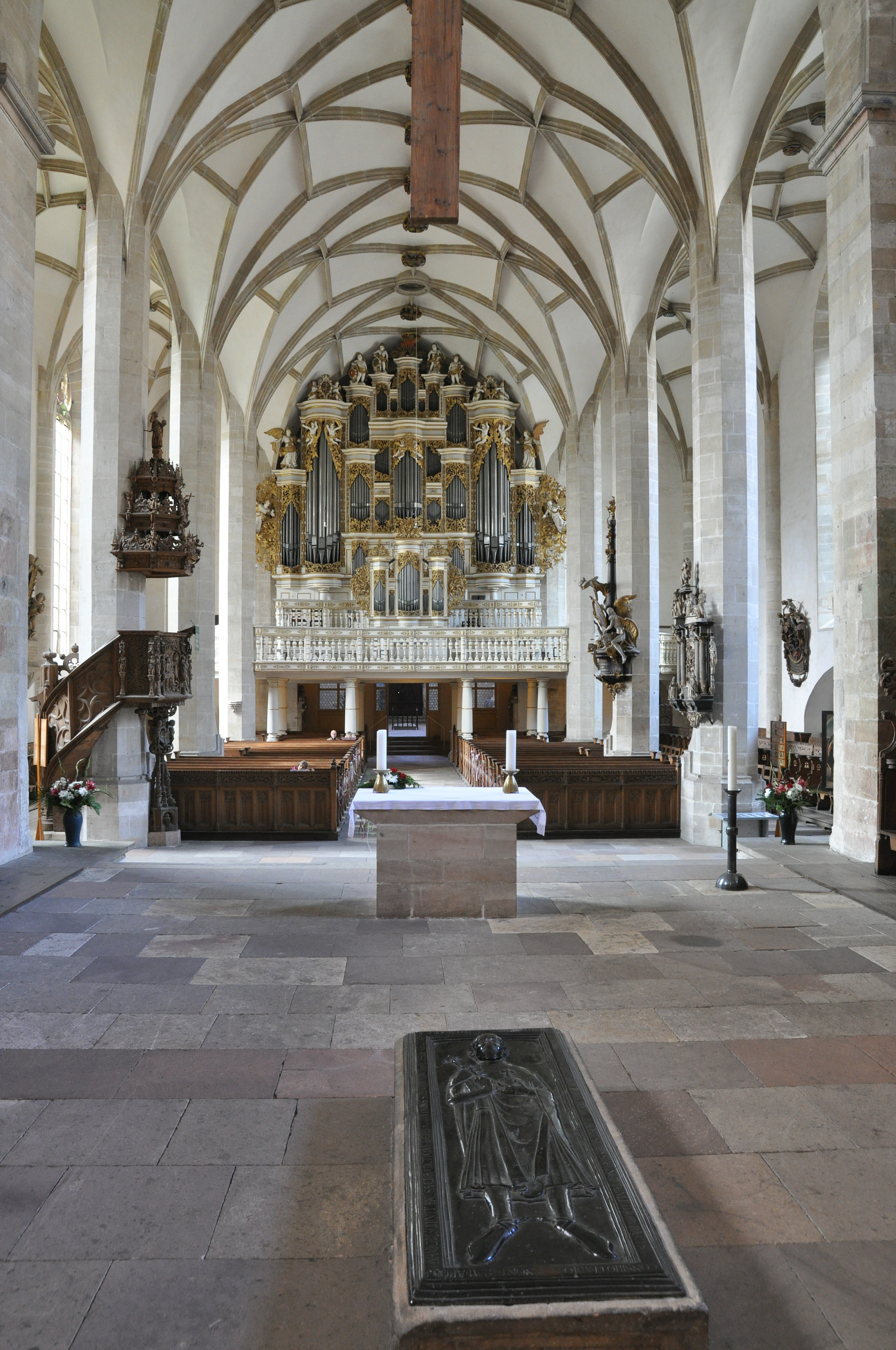 Mittelschiff nach Westen. Im Vordergrund die Grabplatte Rudolfs von Schwaben.